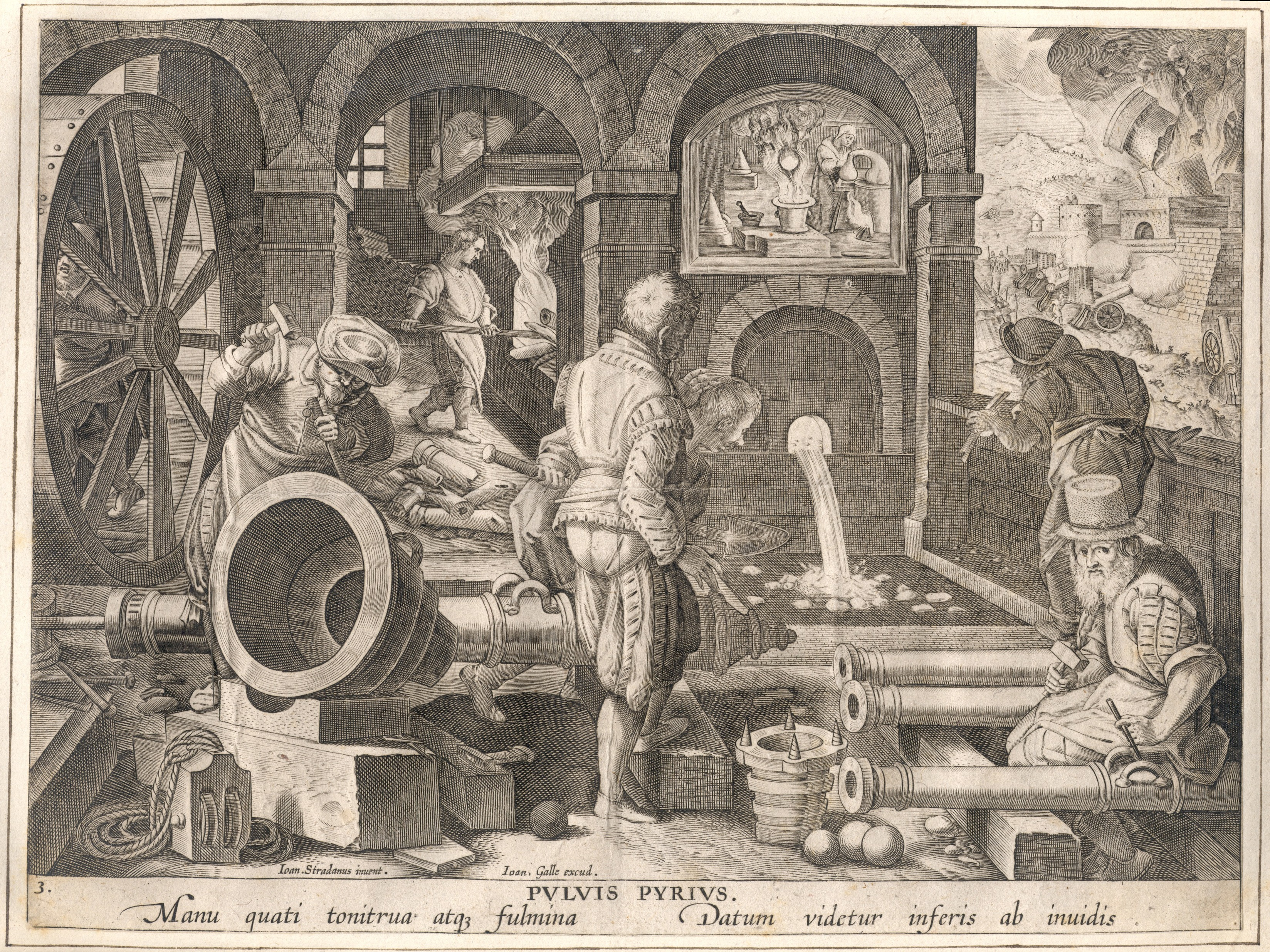 anonymous: The invention of gunpowder Artist anonymous Designer Stradanus (1523–1605) Alternative names Jan van der Straet, Giovanni della Strada, Johannes della Strada, Giovanni Stradano, Johannes Stradano, Giovanni Stradanus, Johannes Stradanus, Jan van Straeten, Jan van StratenDescriptionFlemish painter and draughtsmanDate of birth/death 1523 2 November 1605 Location of birth/death Bruges FlorenceWork location Antwerp (1545), Florence (circa 1550-1605), Rome (circa 1550-1553), Montemurlo (1590)Authority control : Q143595 VIAF: 29699451 ISNI: 0000 0000 8108 906X ULAN: 500011304 LCCN: n84804240 NLA: 35875335 WorldCat creator QS:P170,Q143595 Title De uitvinding van het buskruitPublisher Jan Galle Object type engraving Description Gravure , anoniem, Museum Plantin-MoretusMedium gravureCollection Museum Plantin-Moretus Native nameMuseum Plantin-MoretusLocationAntwerpCoordinates51° 13′ 05.86″ N, 4° 23′ 53.39″ E Established1877 Web page control : Q595802 VIAF: 130668175 ISNI: 0000 0001 2285 9666 LCCN: n50051109 UNESCO: 1185 GND: 1007736-4 WorldCat institution QS:P195,Q595802Accession number PK OPB 0186 004References described at URL: Source/Photographer Museum Plantin-Moretus Native nameMuseum Plantin-MoretusLocationAntwerpCoordinates51° 13′ 05.86″ N, 4° 23′ 53.39″ E Established1877 Web page control : Q595802 VIAF: 130668175 ISNI: 0000 0001 2285 9666 LCCN: n50051109 UNESCO: 1185 GND: 1007736-4 WorldCat institution QS:P195,Q595802Permission(Reusing this file) This file is made available under the Creative Commons CC0 1.0 Universal Public Domain Dedication. The person who associated a work with this deed has dedicated the work to the public domain by waiving all of their rights to the work worldwide under copyright law, including all related and neighboring rights, to the extent allowed by law. You can copy, modify, distribute and perform the work, even for commercial purposes, all without asking permission. Gravure , anoniem, Museum Plantin-Moretus